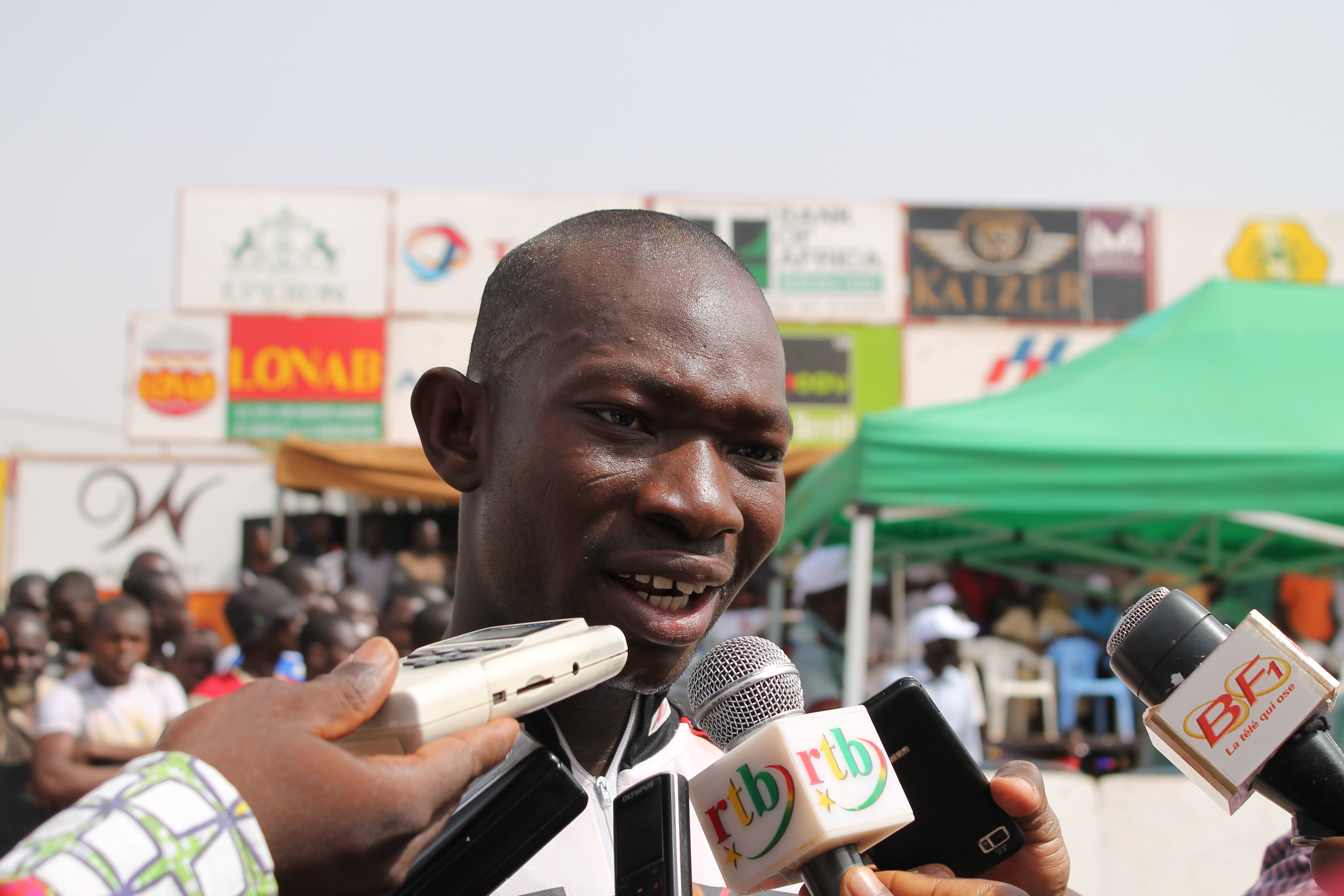 Rasmané Ouédraogo répond à la presse, à Ouagadougou (Burkina-Faso), suite à sa victoire au Grand Prix de l'Impossible 2013.